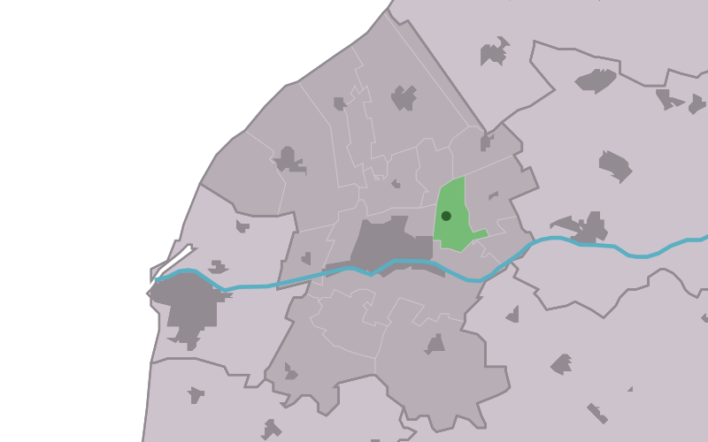 Kaartsje fan himrik fan Skalsum